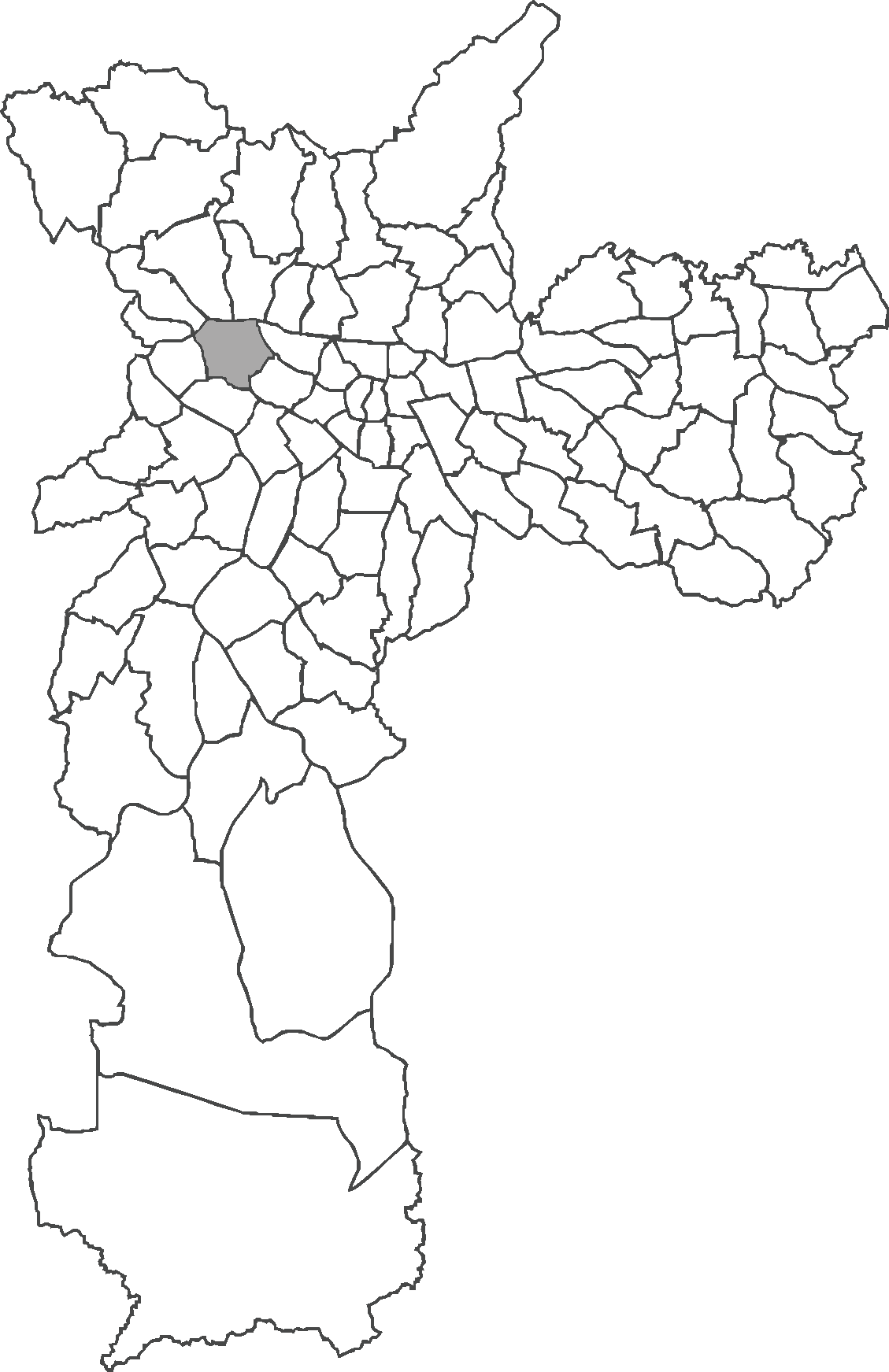 Localização do distrito da Lapa no município de São Paulo.